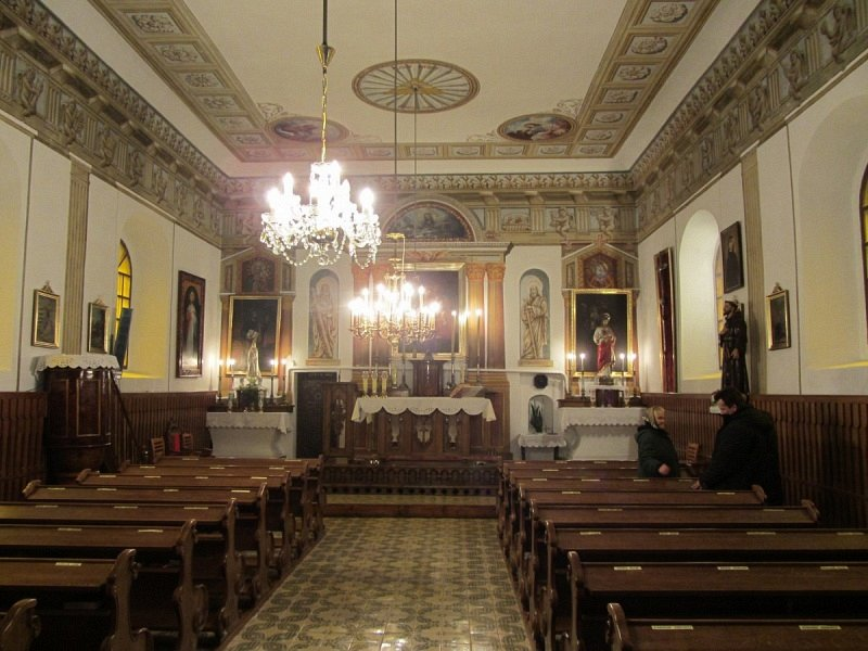 Крамяніца. Касцёл